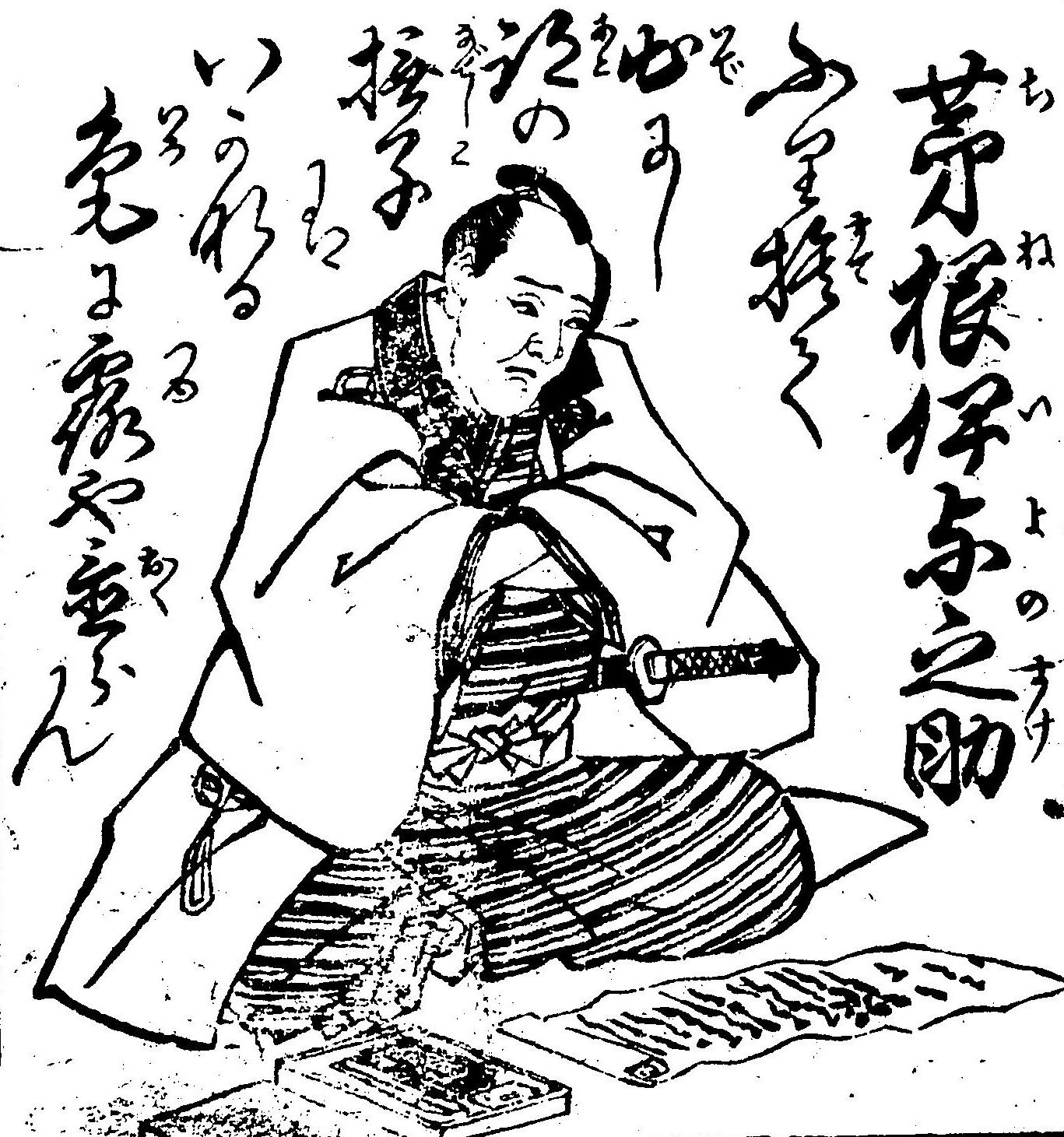 茅根伊予之介の肖像。